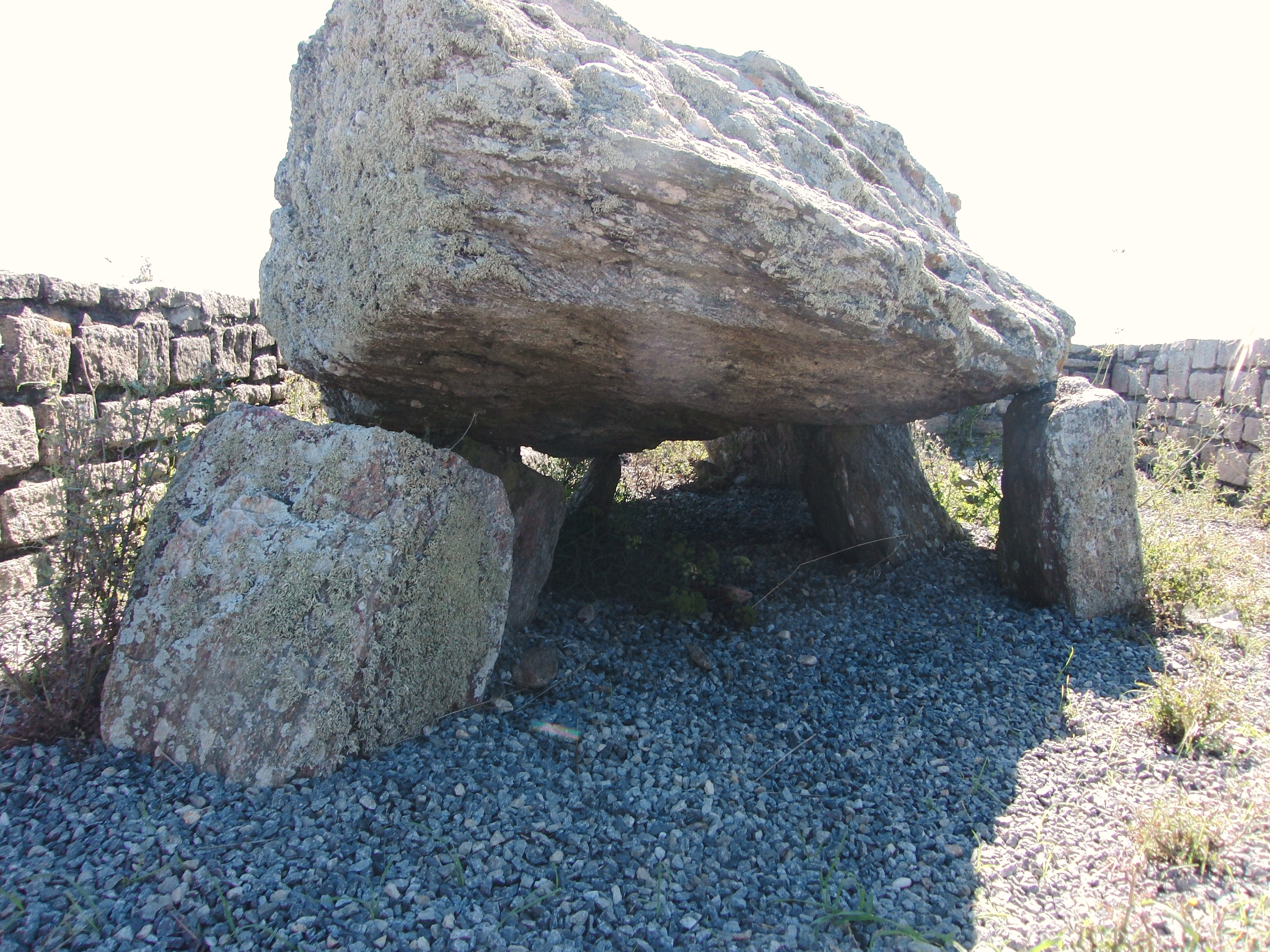 Le dolmen près du Port aux Moines, Saint-Gildas-de-Rhuys dans le Morbihan, Bretagne. .